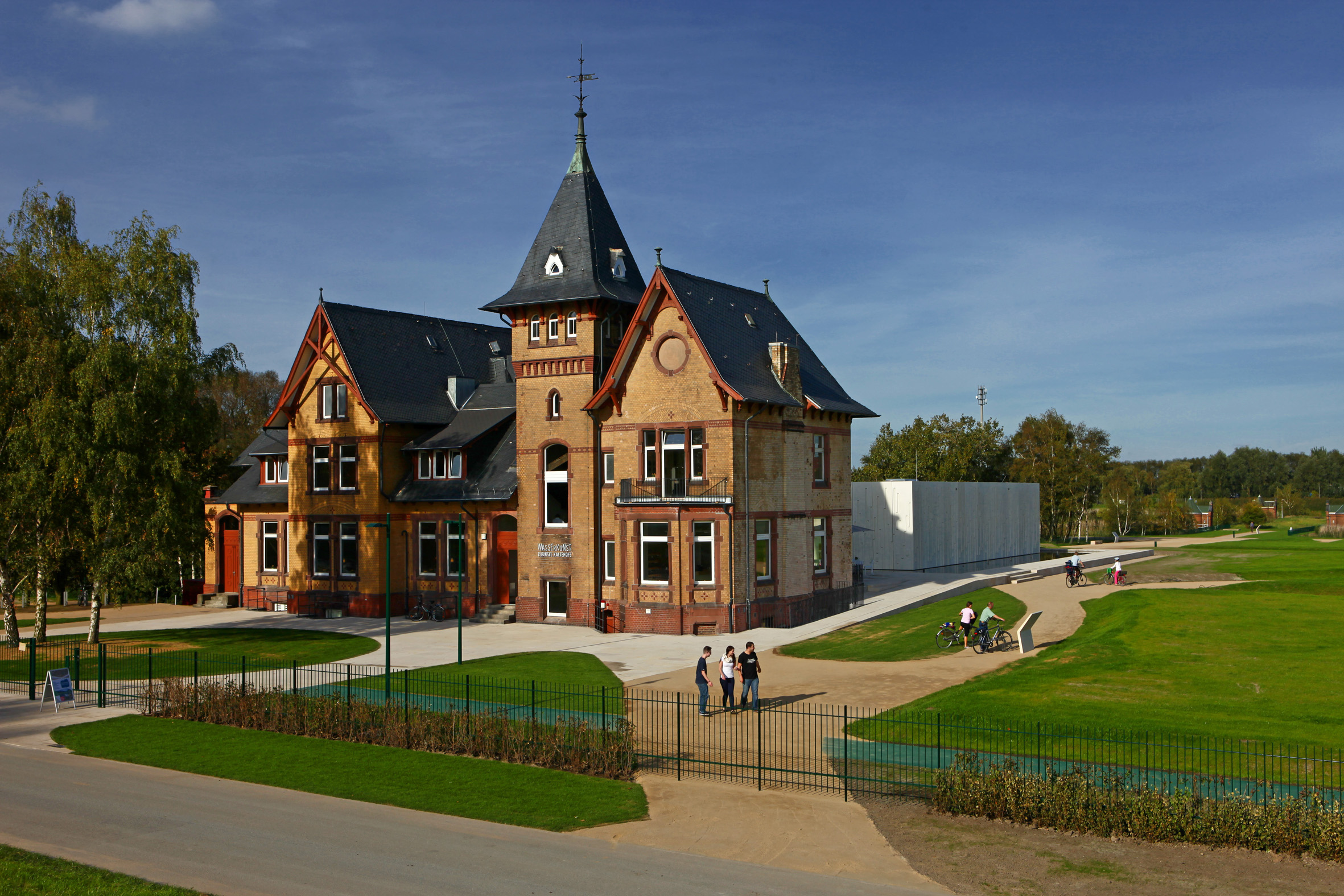 Die Jugendstilvilla der Außenstelle des ehemaligen Institutes. Die Villa beherbergt heute ein Museum. This is a photograph of an architectural monument.